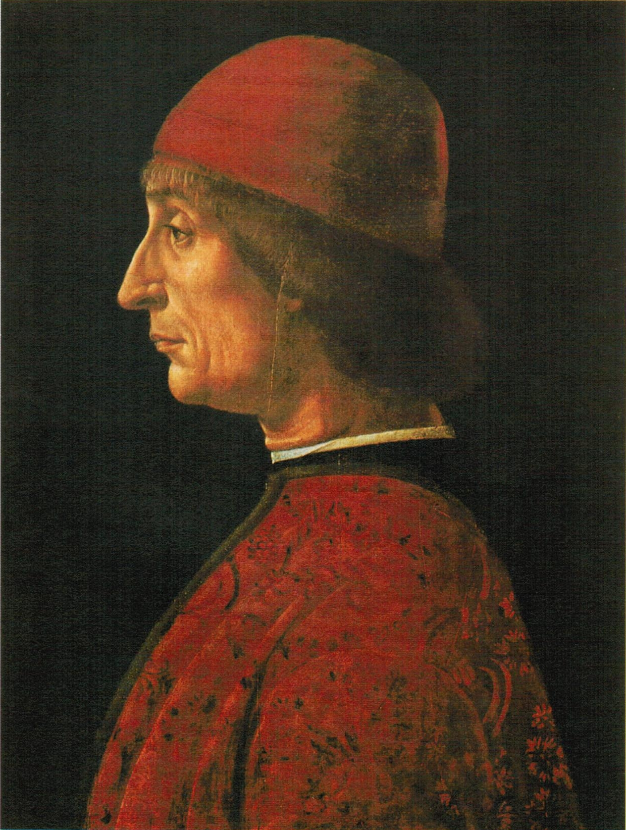 Portrait of Francesco Brivio // Museo Poldi Pezzoli, Milan